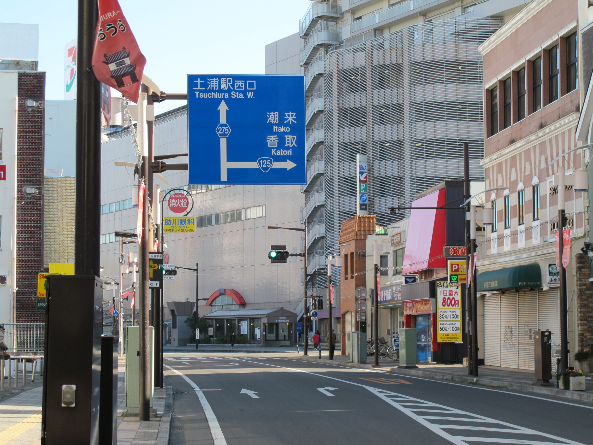 茨城県道275号土浦停車場線の終点